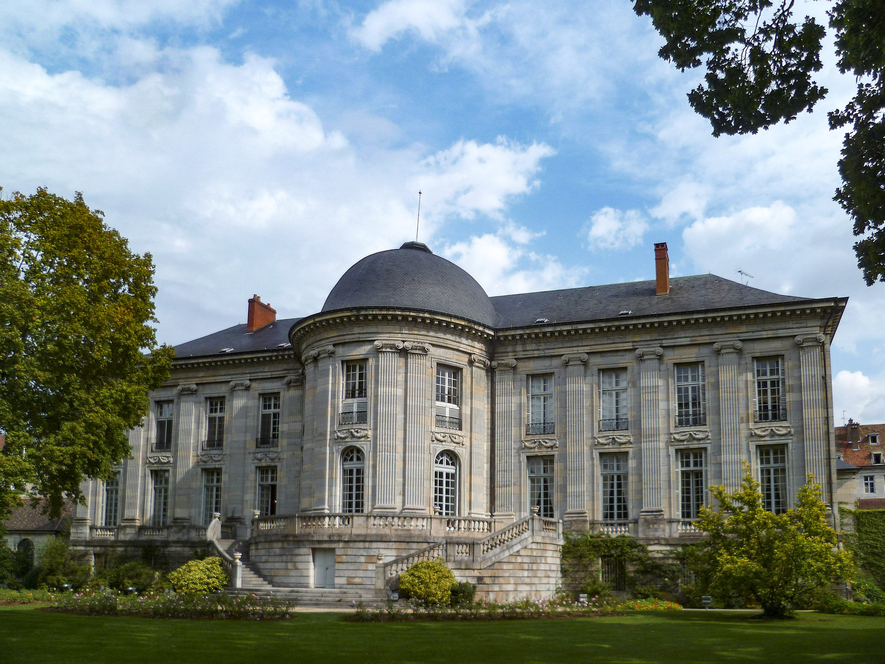 façade sur jardin de l'ancienne intendance de Franche-Comté, et actuelle préfecture.